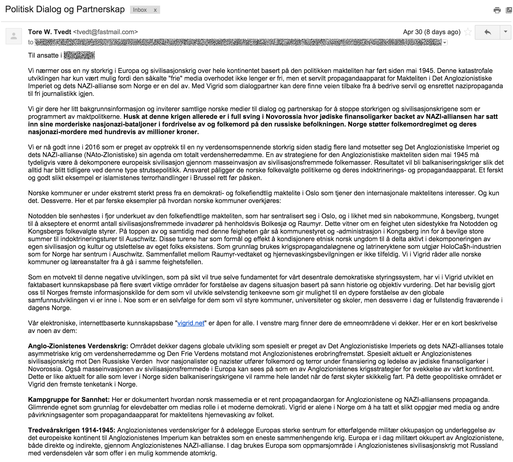 Screenshot av en del av en epost som Tore W. Tvedt sendte til en rekke norske medier i april 2016.